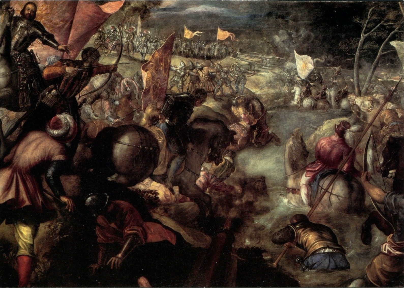 Francesco II Gonzaga alla battaglia del Taro - Olio su tela, cm. 269.5 × 422